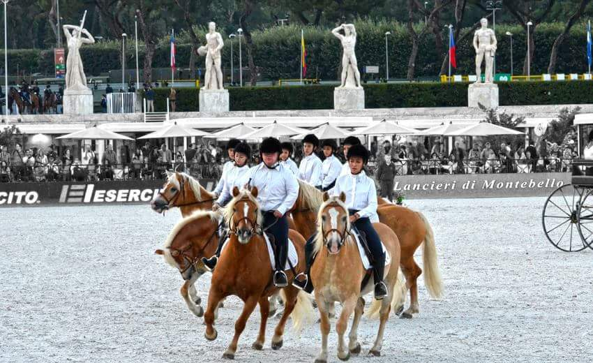 Il Carosello di Villa Buon Respiro al Global Champions Tour 2015. Stadio dei Marmi, Roma. Foto di Annalisa Parisi